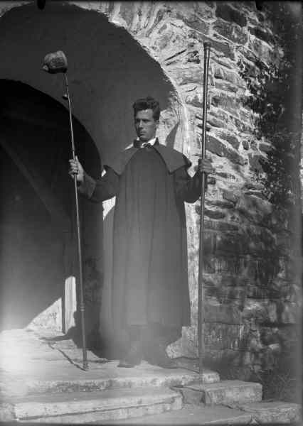 Kyrkovaktarkappa av brun ylletuskaft. Krage och ärmuppvikningar av rött ylletuskaft hållandes med kollekthåv och kyrkstöt. Snabbinv. Kategori: (07) Textilier Kyrkovaktarkappa av brun ylletuskaft. Krage och ärmuppvikningar av rött ylletuskaft hållandes med kollekthåv och kyrkstöt. Snabbinv.